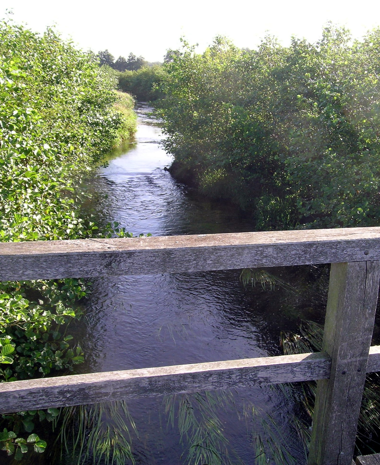 renaturierte Meiße beim NSG Meißendorfer Teiche/Bannetzer Moor The renaturalised River Meiße in the Meißendorf Lakes and Bannetzer Moor nature reserve, Lower Saxony, Germany.